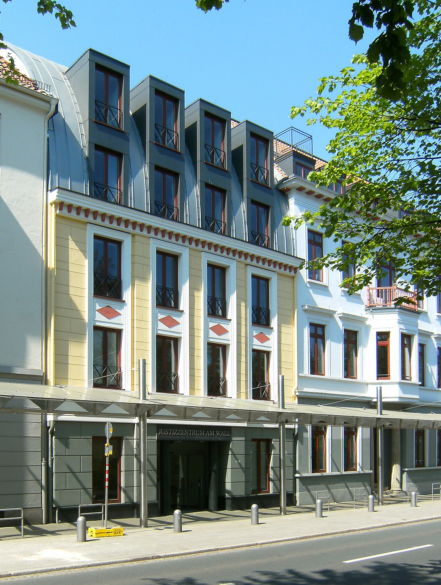 Justizzentrum Am Wall, Am Wall 198, 28195 Bremen